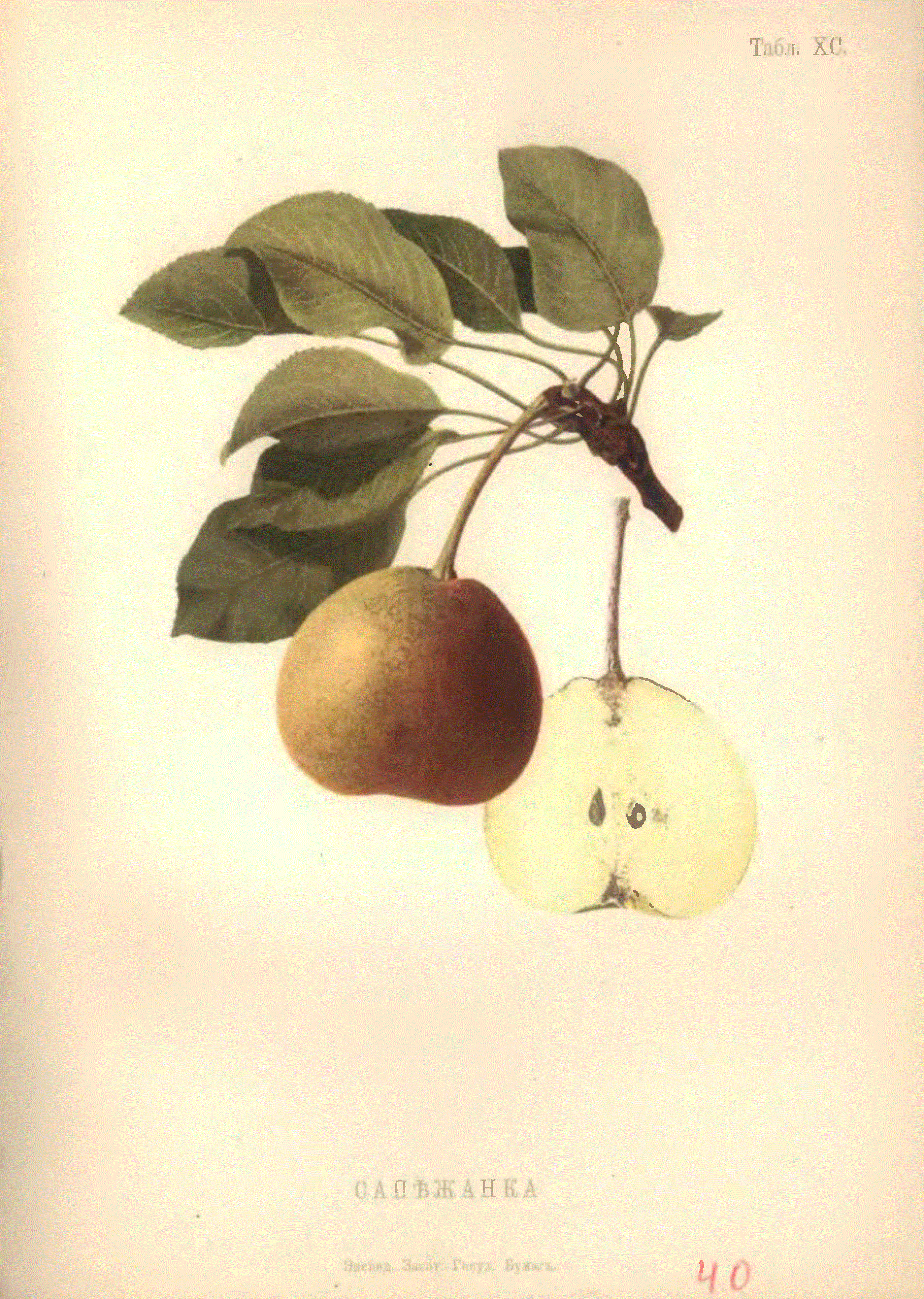 Сапежанка